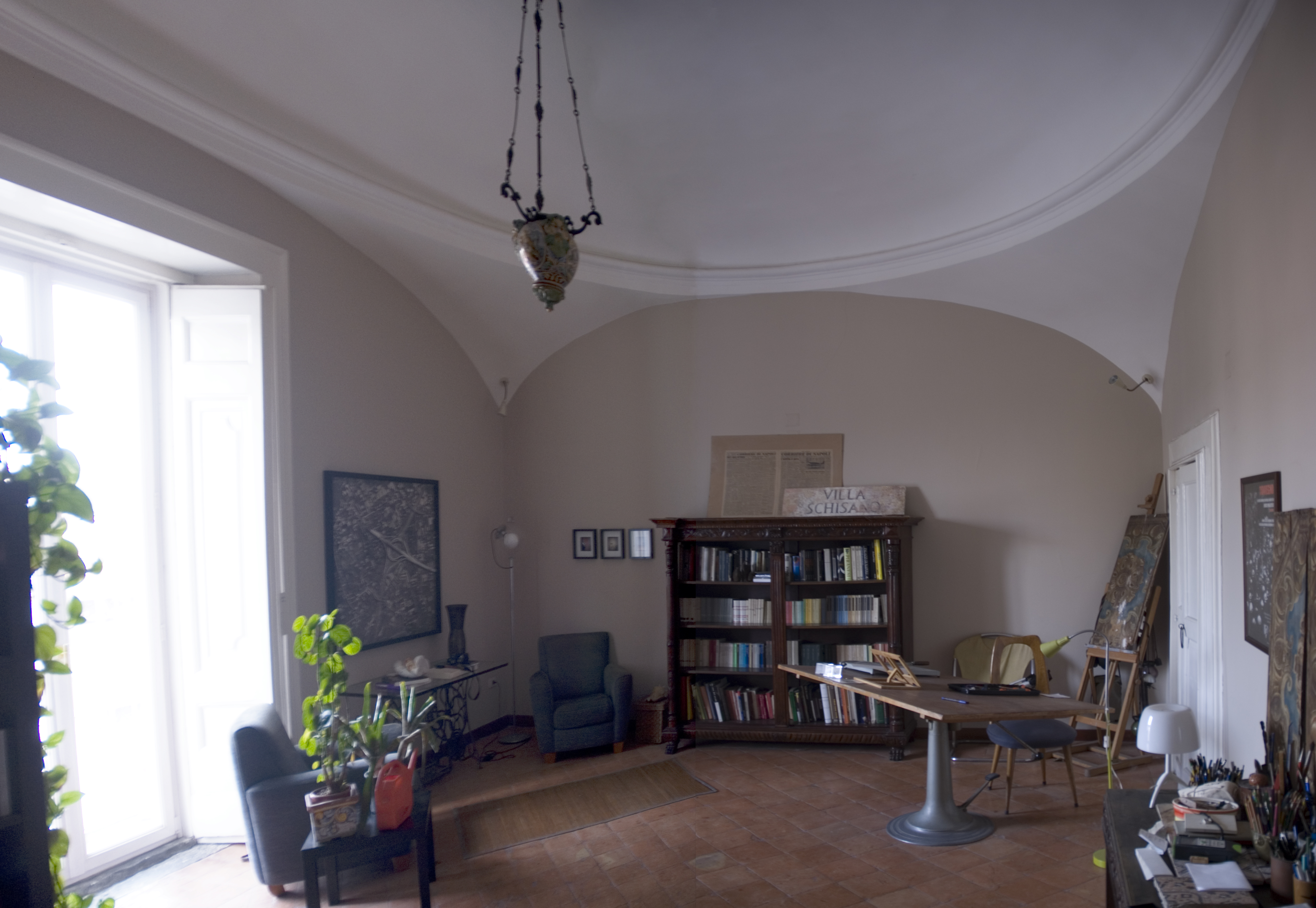 Villa Papa - Interni